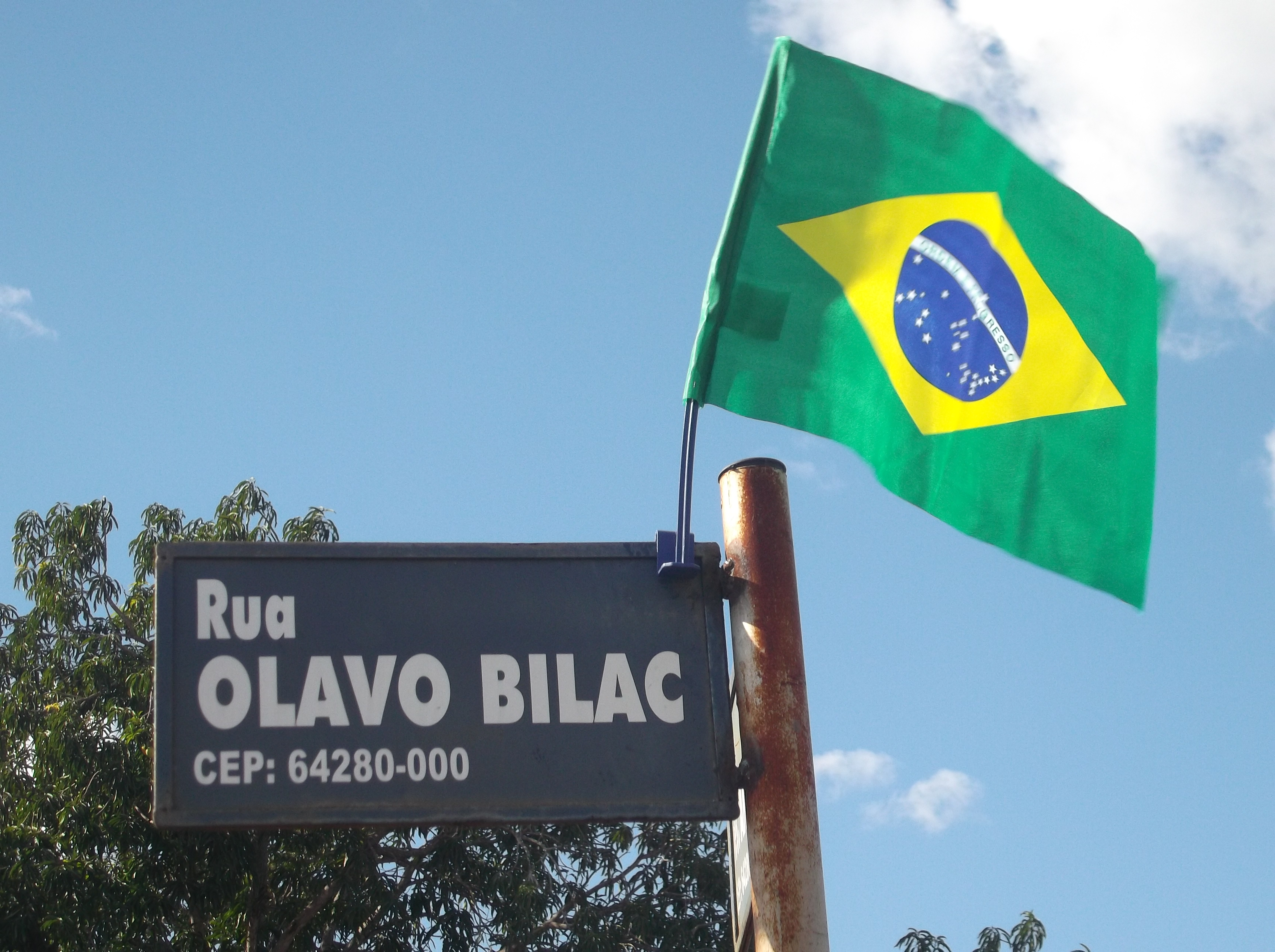 Placa de rua com o nome de Olavo Bilac com a Bandeira do Brasil, em Campo Maior,Piauí.